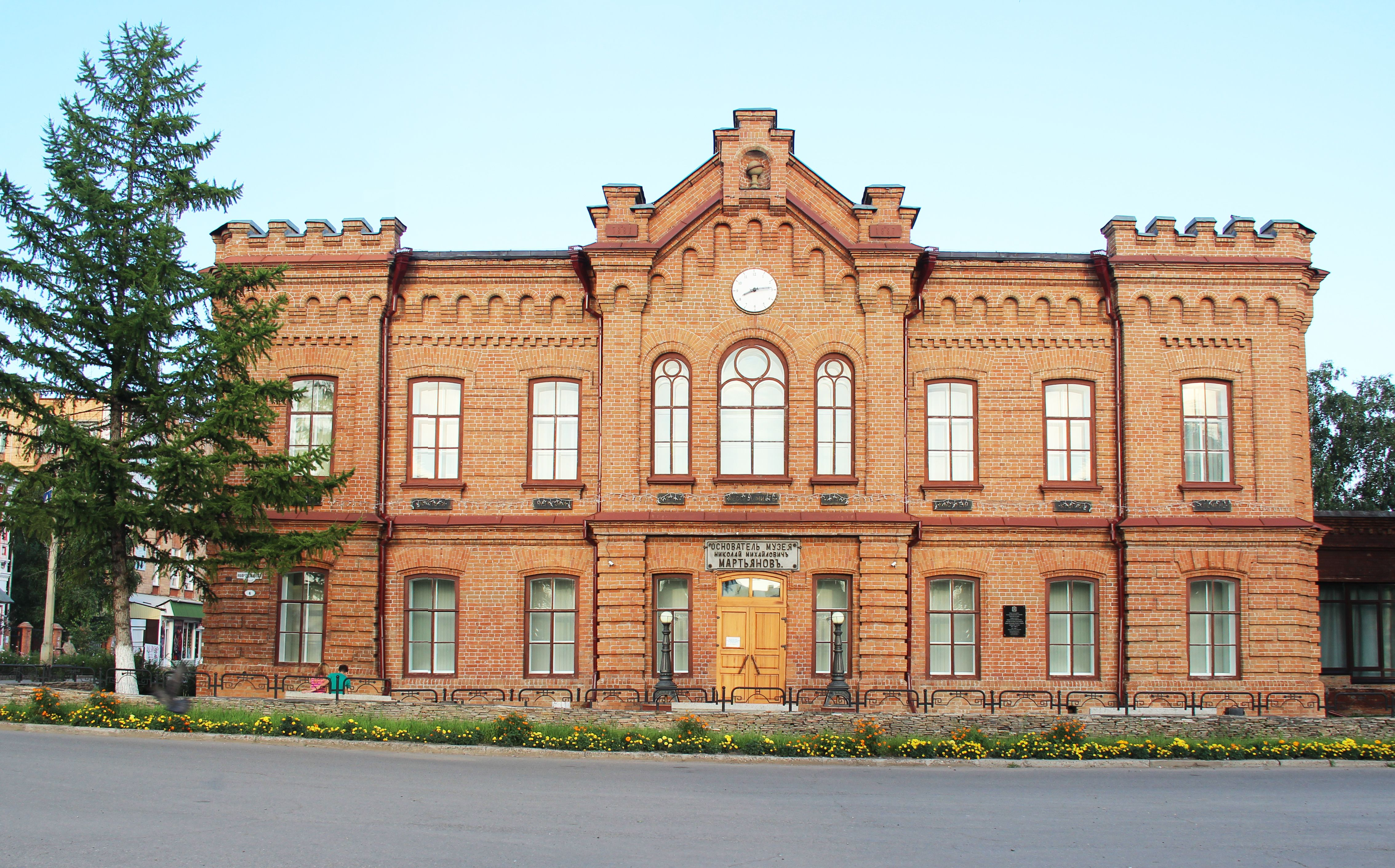 Главная достопримечательность города — Минусинский краеведческий музей им. Н. М. Мартьянова, основанный в 1877 году.